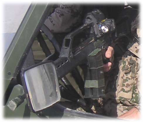 G36A1 mit LLM01 als Vorderansicht selbst fotografiert Khyperpass 18112005